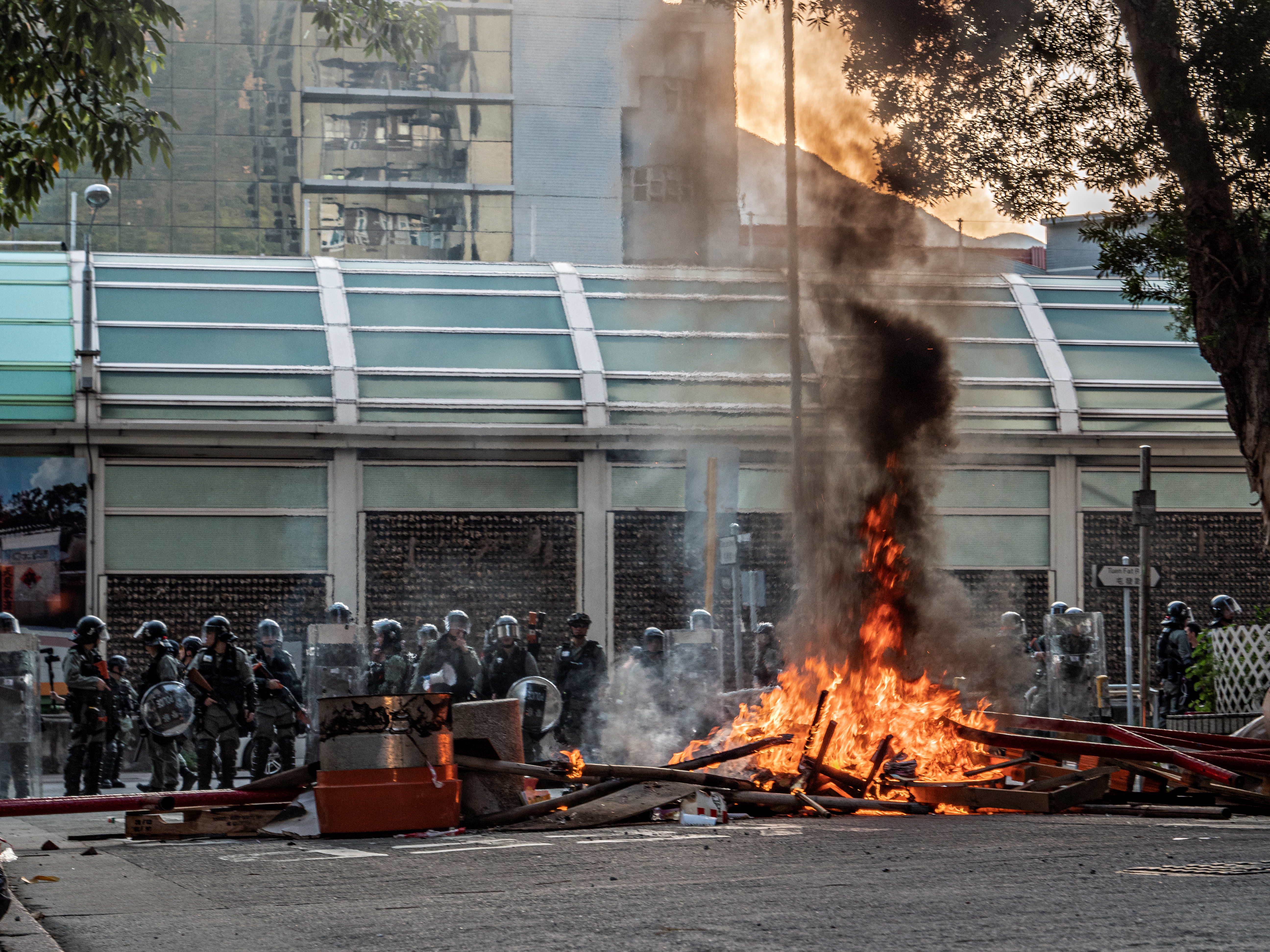 2019-09-22 Tuen Mun 光復屯門公園遊行